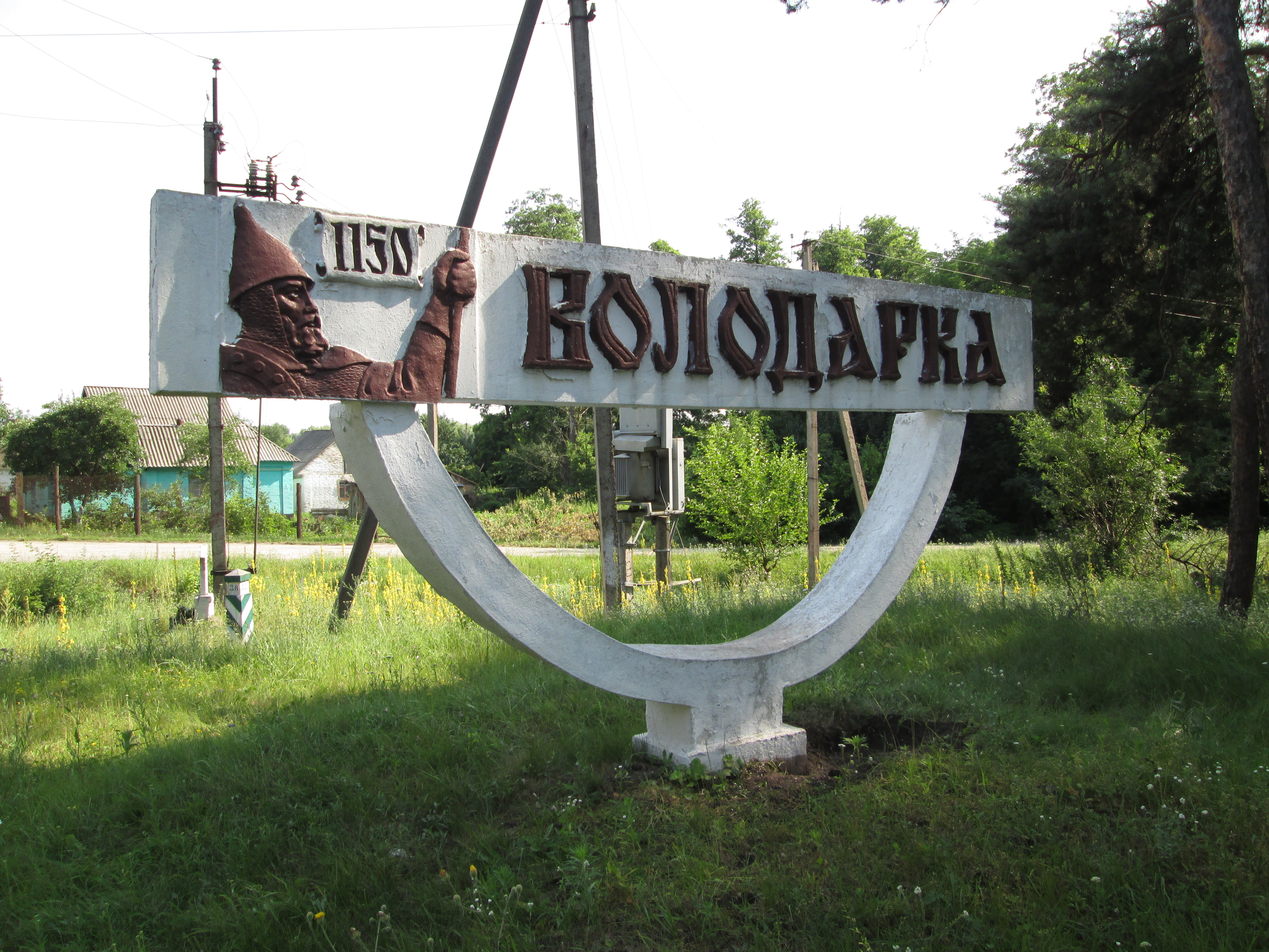 Знак на въезде в Володарку